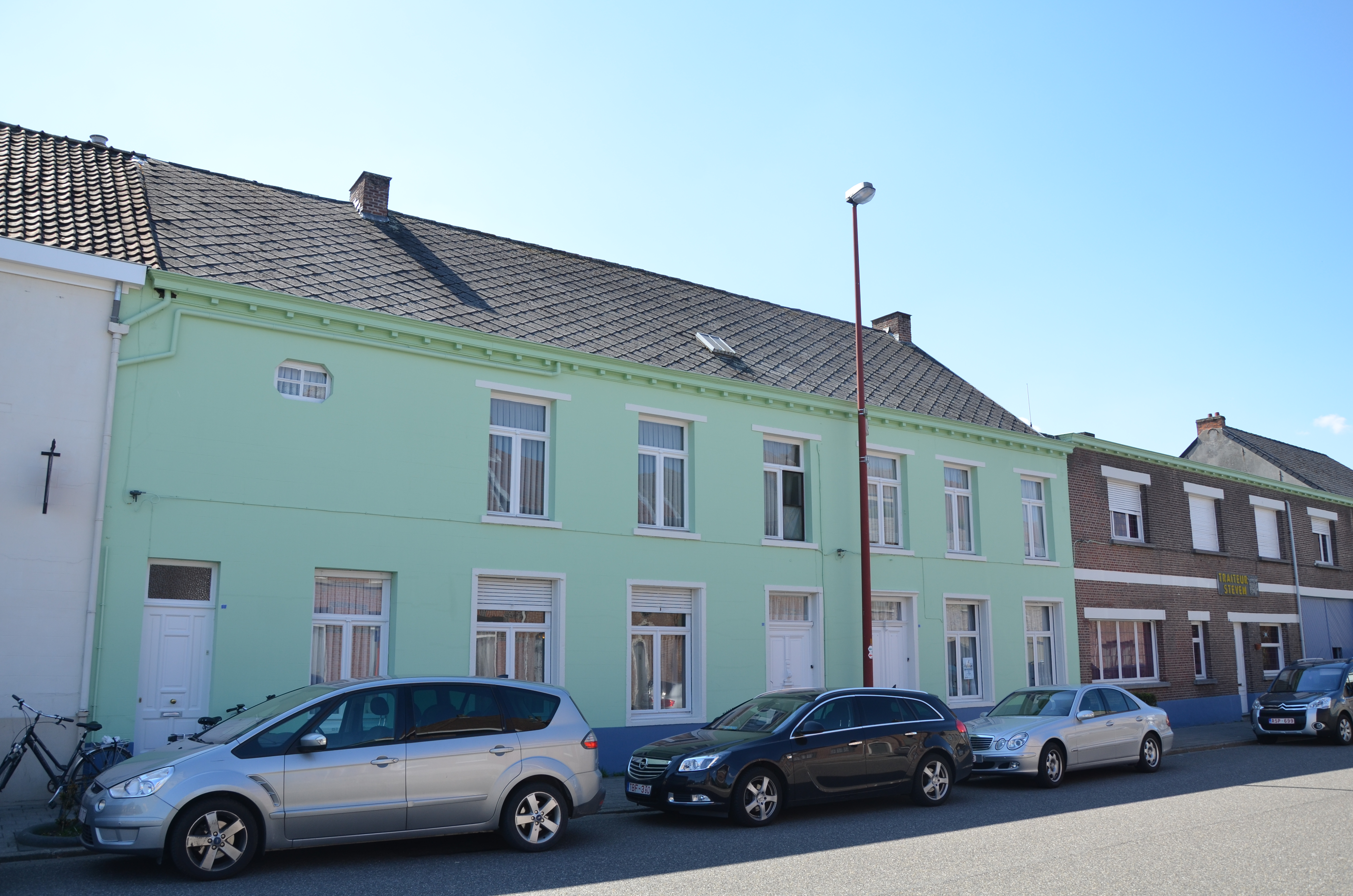 Ferdinand Maestraat 54-56-58